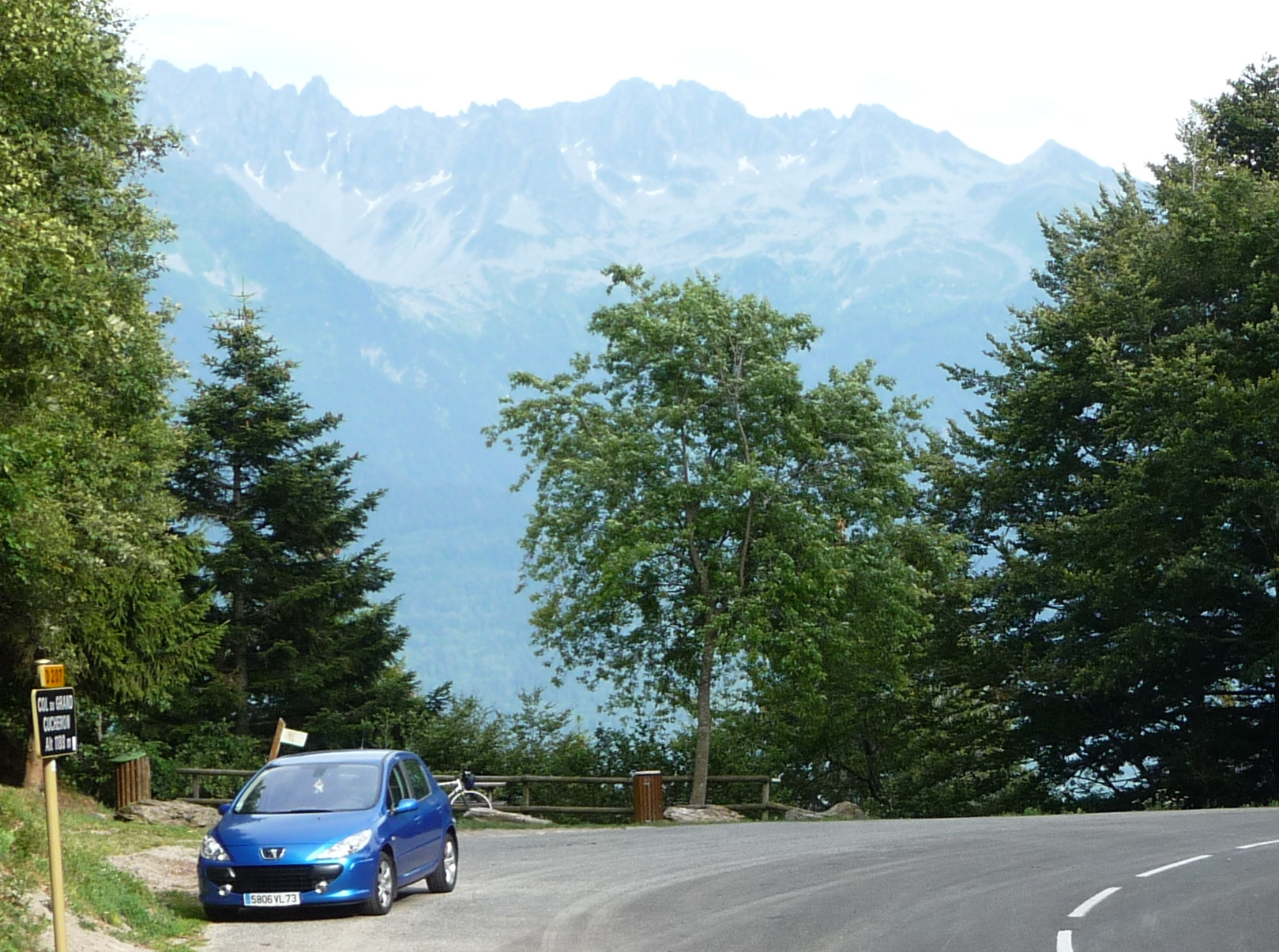 Col du Grand Cucheron avec vu au fond sur le massif de la Lozière